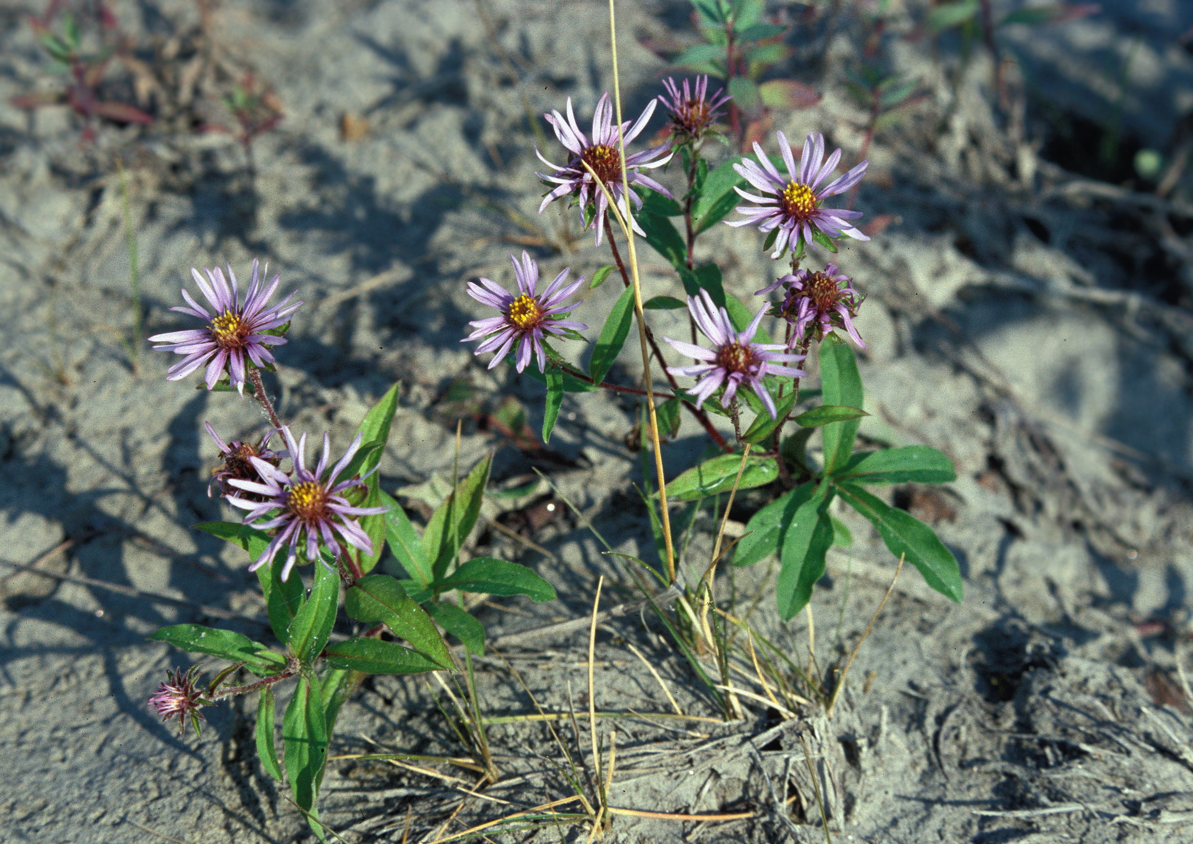 Aster_sibiricus